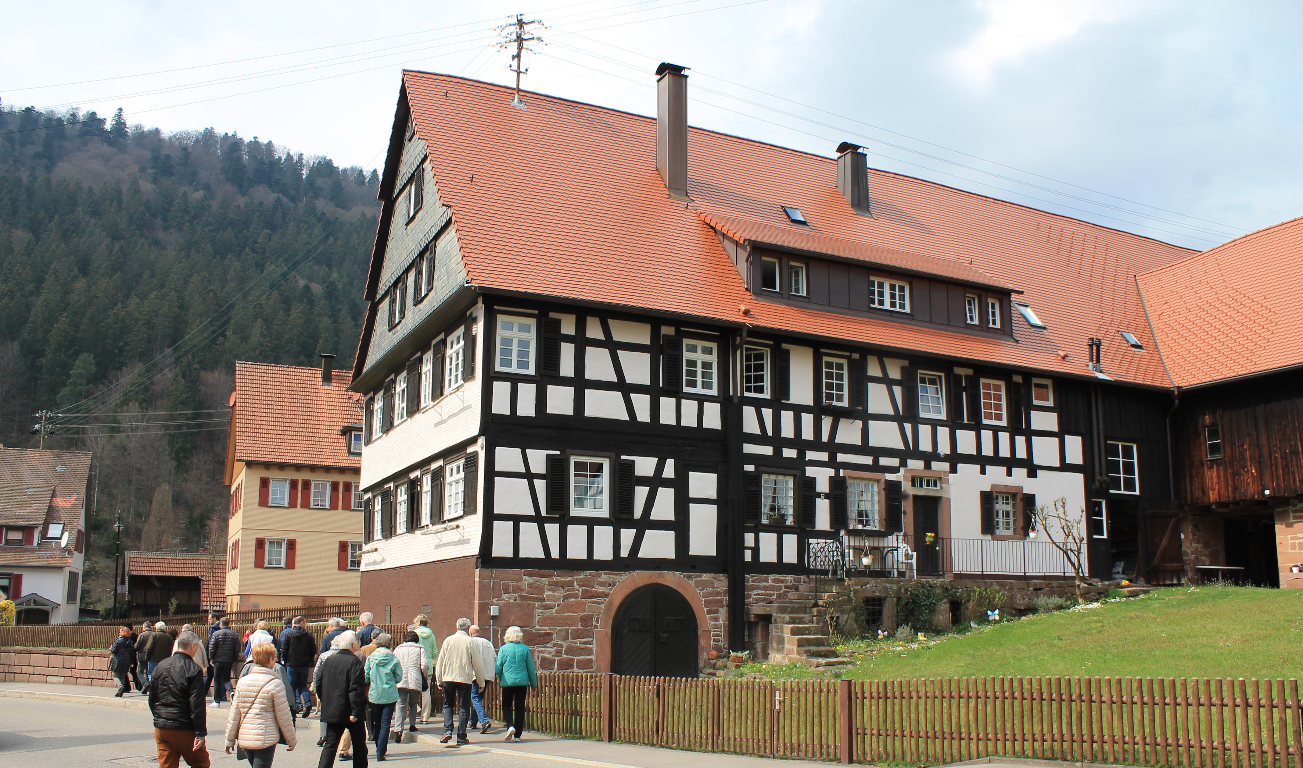 Haus Lustnauer in Höfen an der Enz